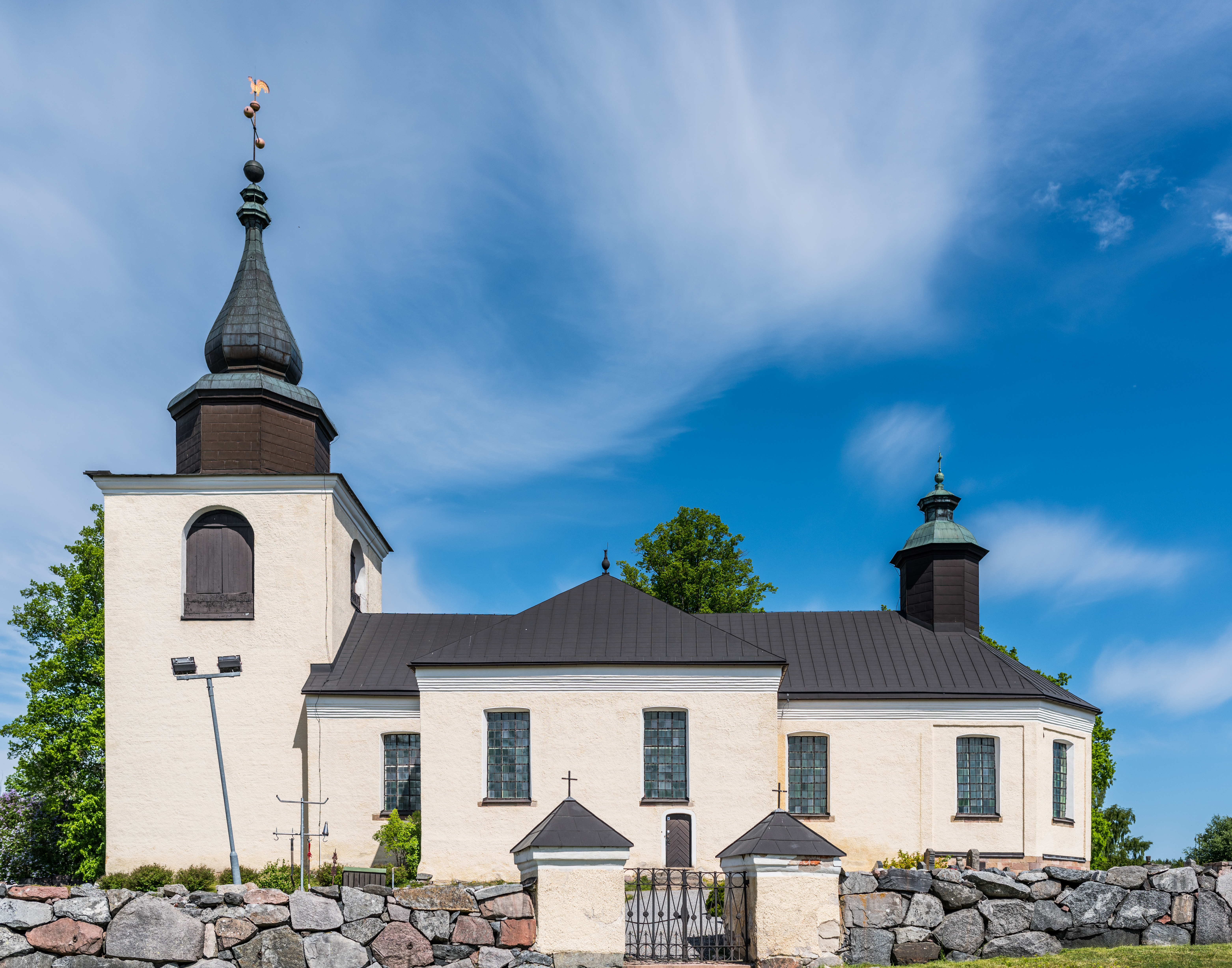 Östra ryds kyrka, Österåker, Sweden